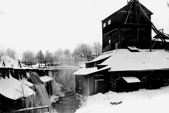 Brattforshyttan omkring 1920. Foto av Ölander.